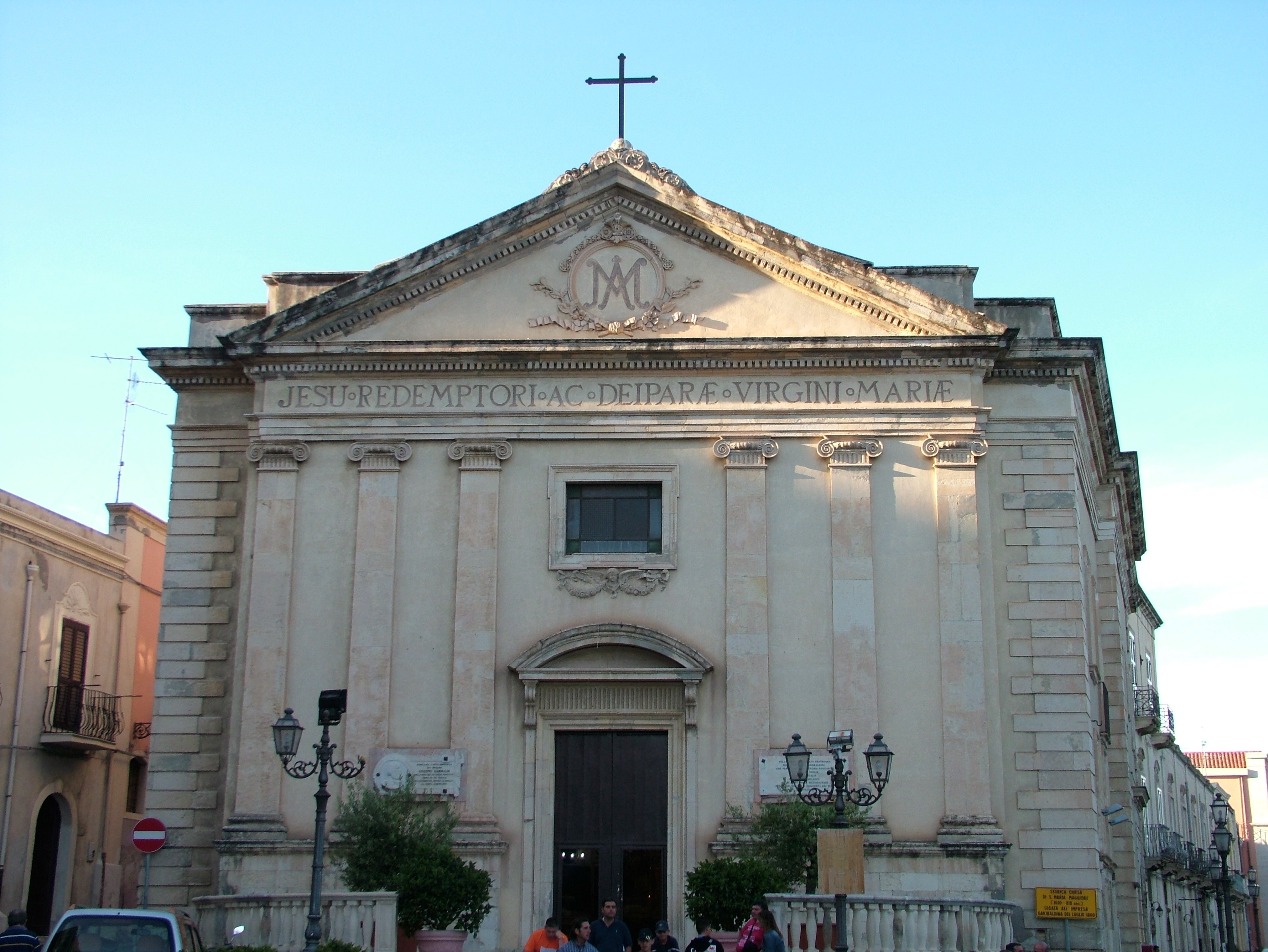 Milazzo, Sizilien, Chiesa S. Maria maggiore